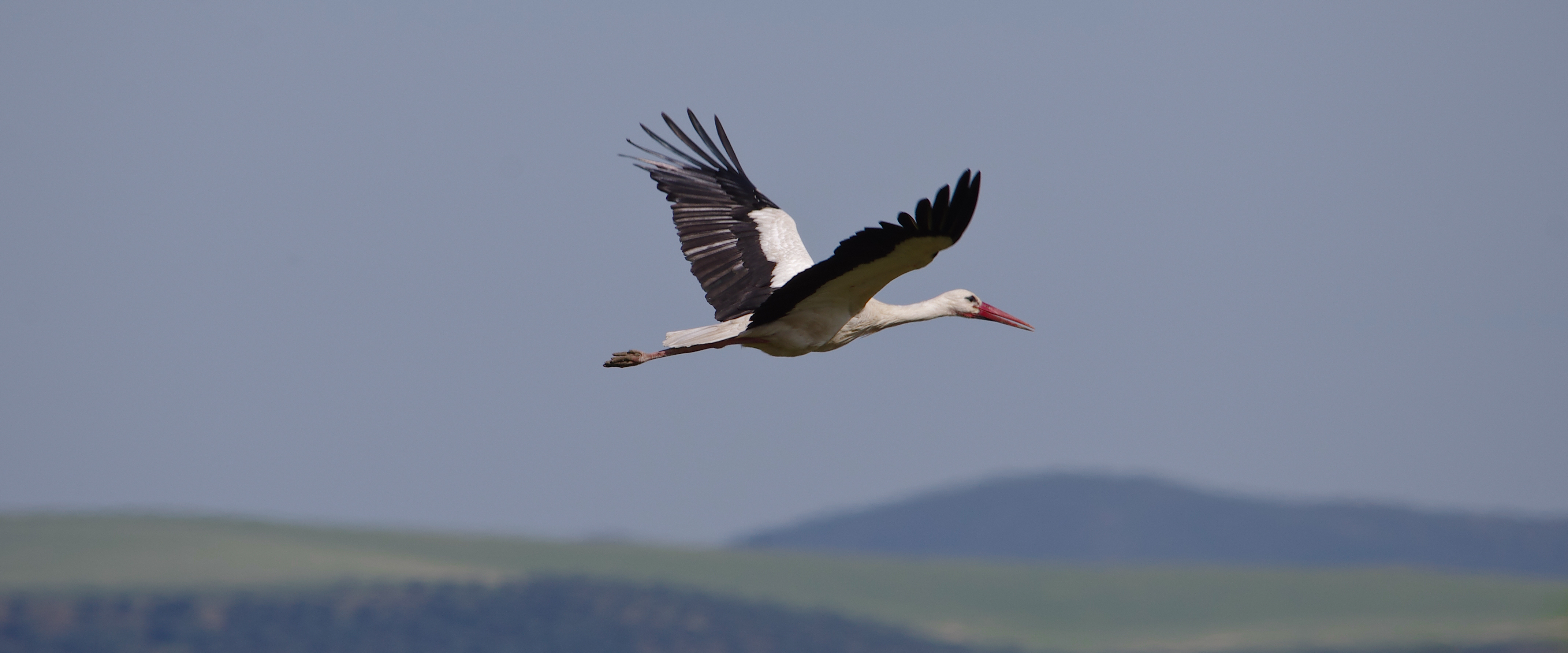 Cigogne blanche à Ichkeul